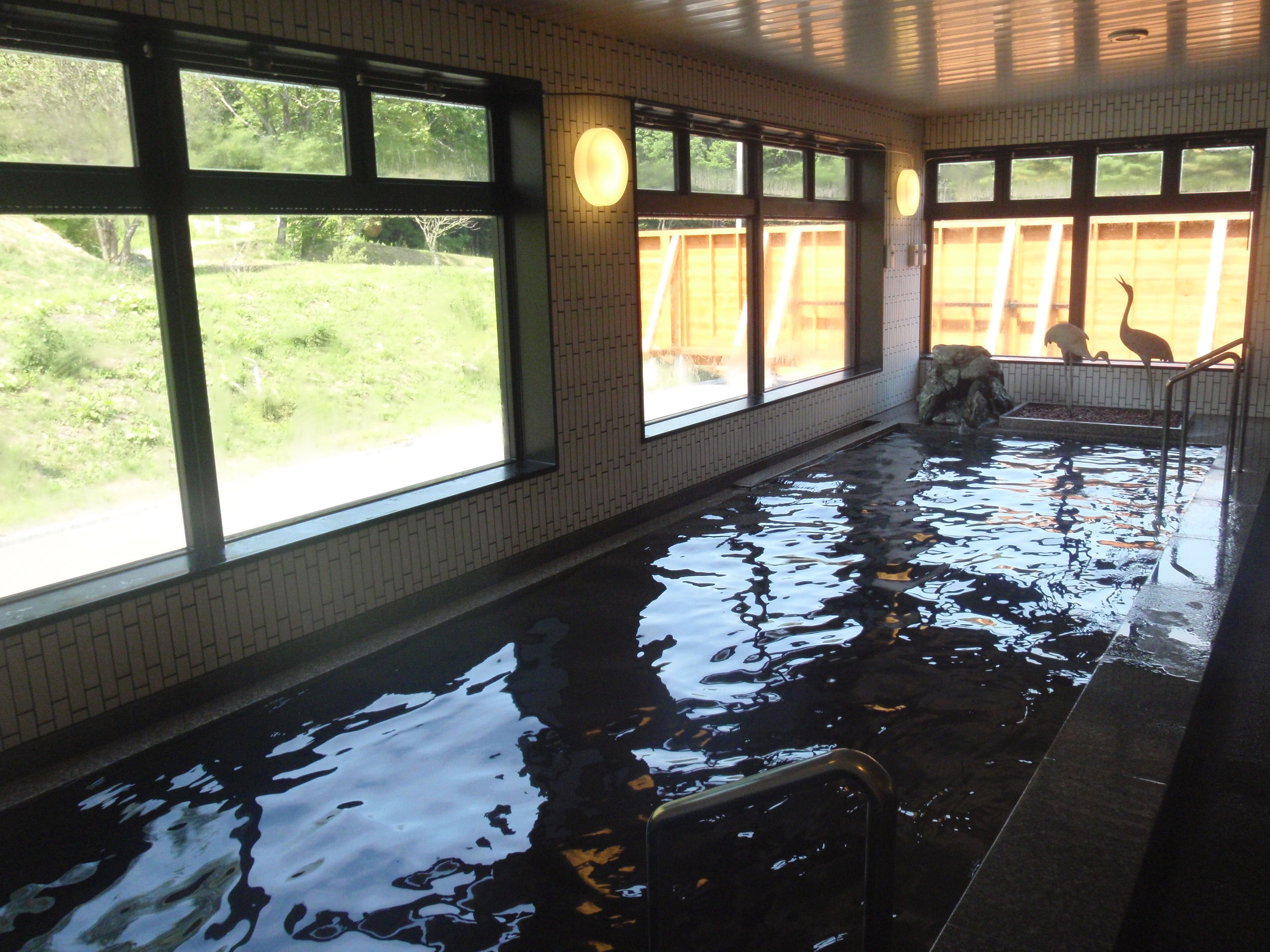 鶴の湯温泉浴室